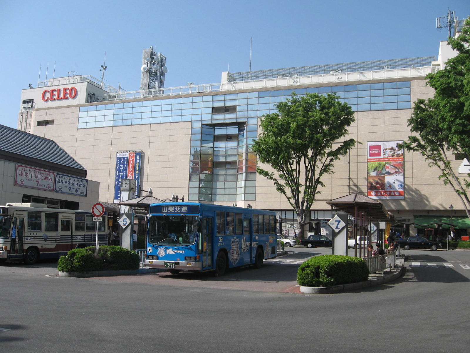 甲府駅ビル「セレオ」